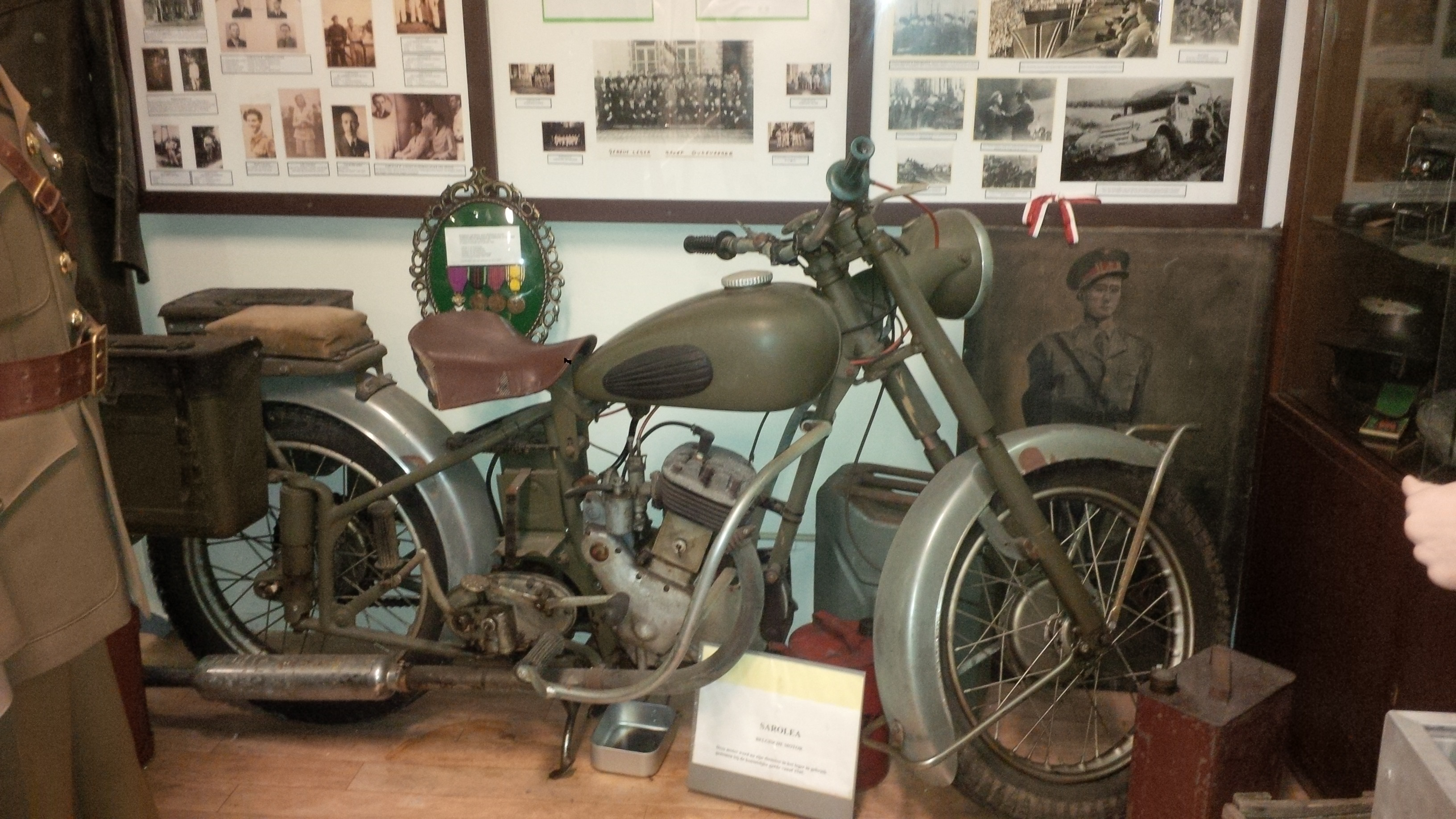 Een lergerbrommer uit de tweede wereldoorlog